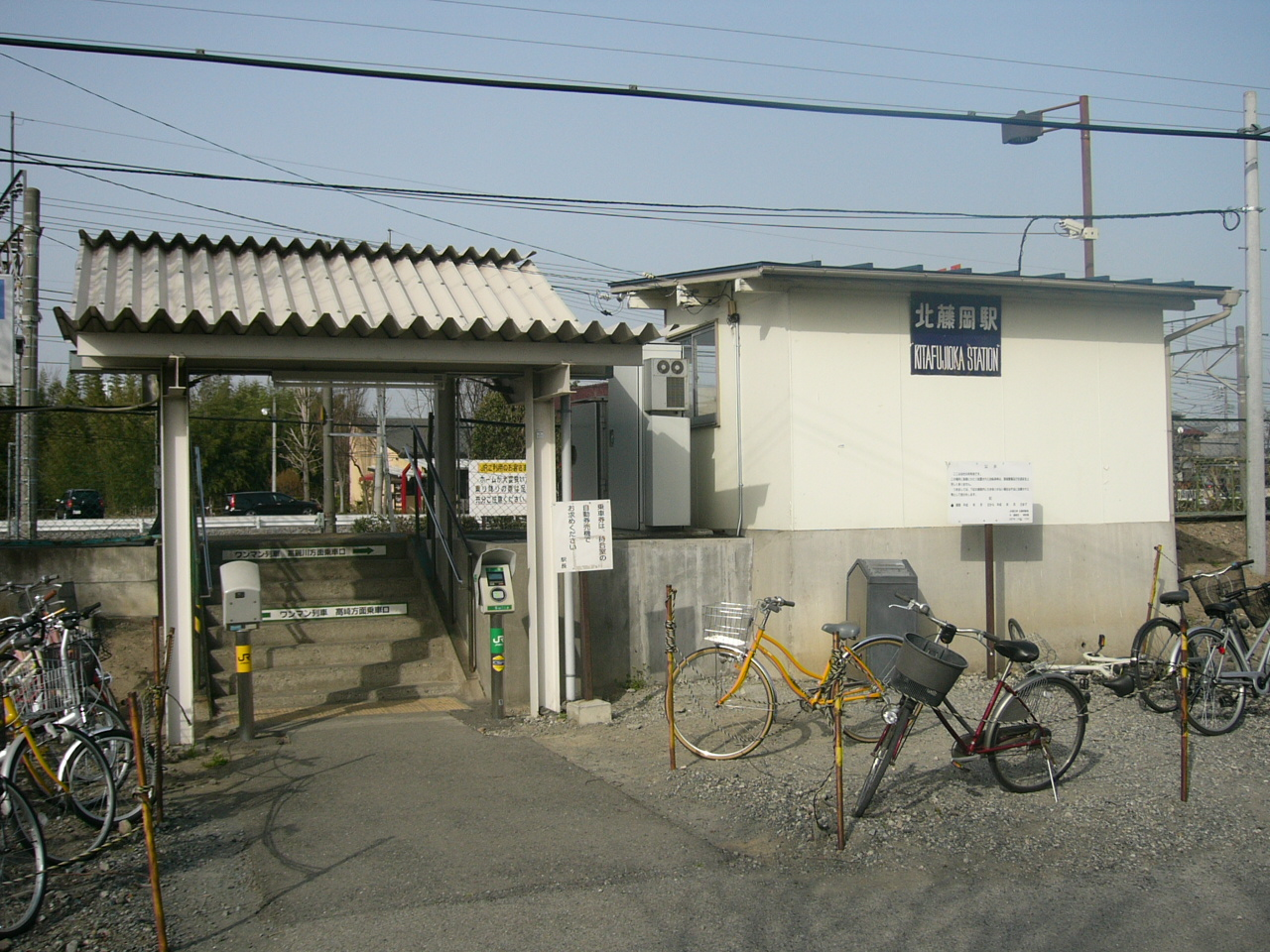 Kita-Fujioka Station